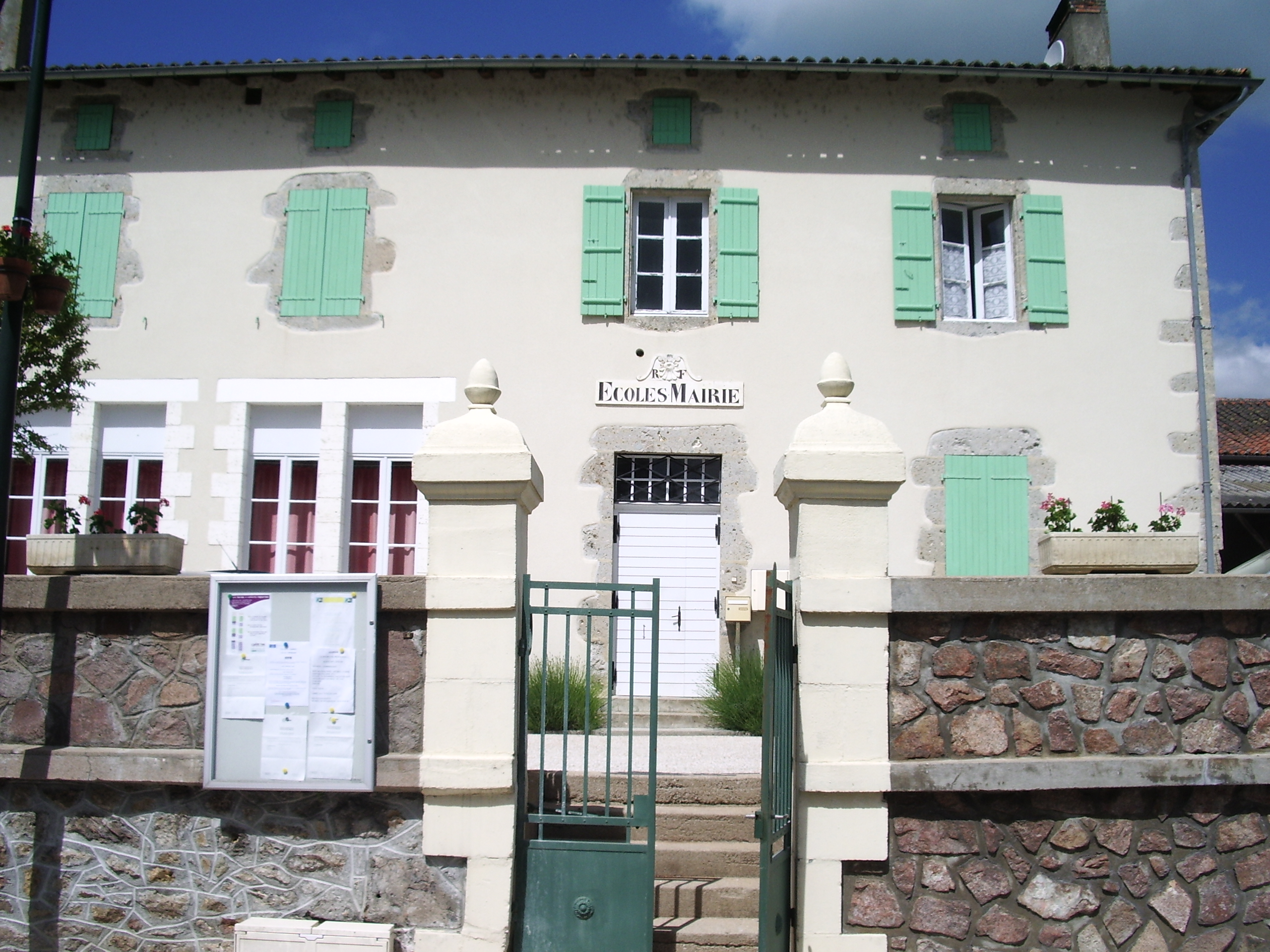 Mairie de Pressignac (Charente, France)